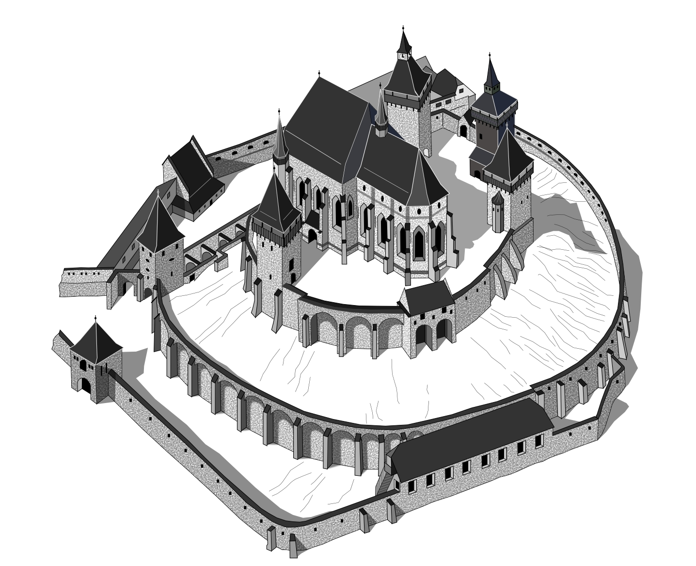 Biserica fortificata din Biertan.